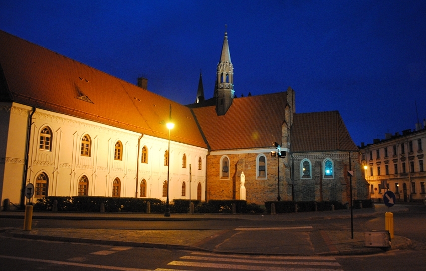 Iluminacja Kościoła św. Witalisa oraz biblioteki Wyższego Seminarium Duchownego we Włocławku